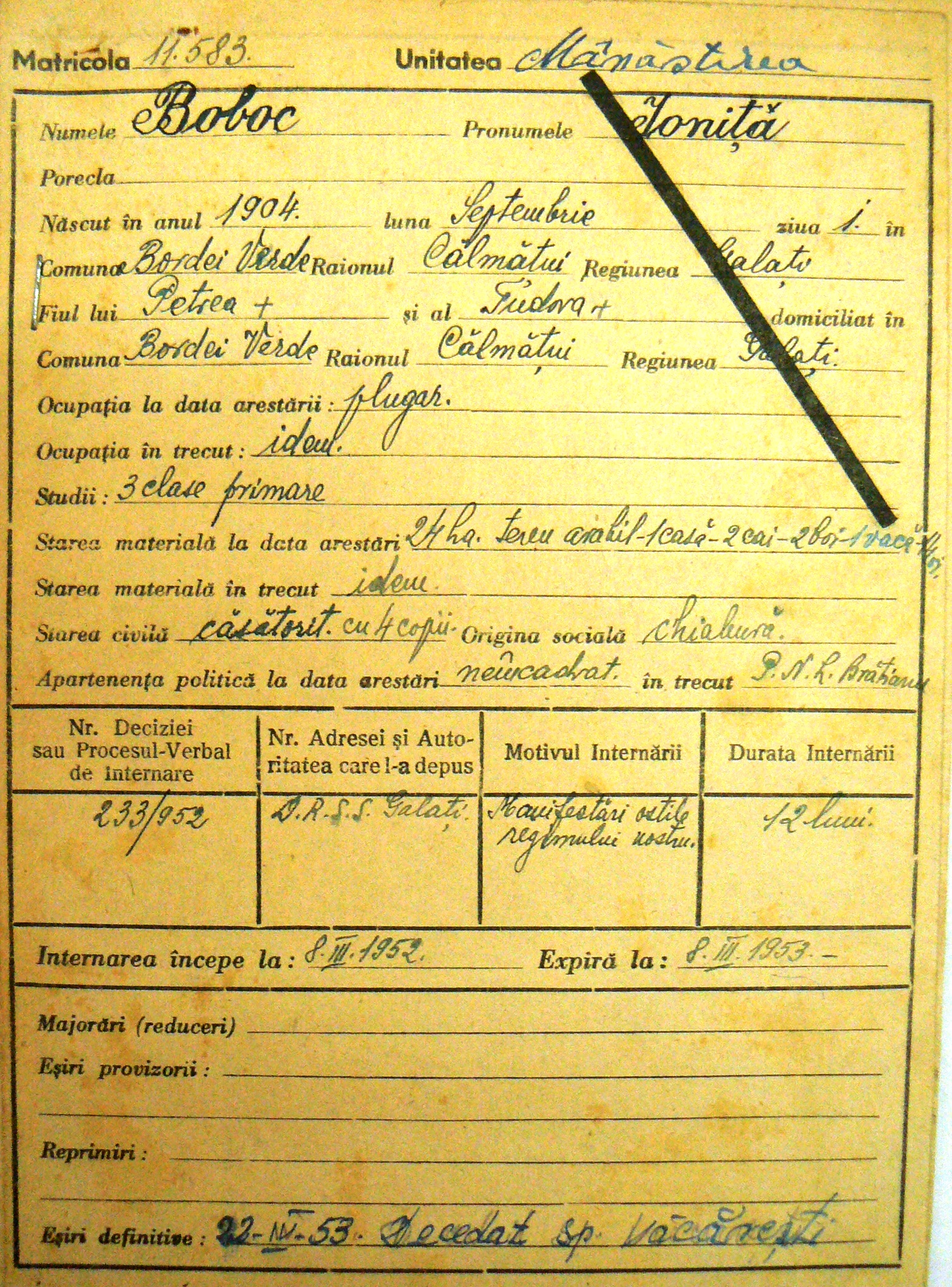 Fisa detinutului politic Ioniţă Boboc din comuna Bordei Verde, mort în 1953 la închisoarea Văcăreşti